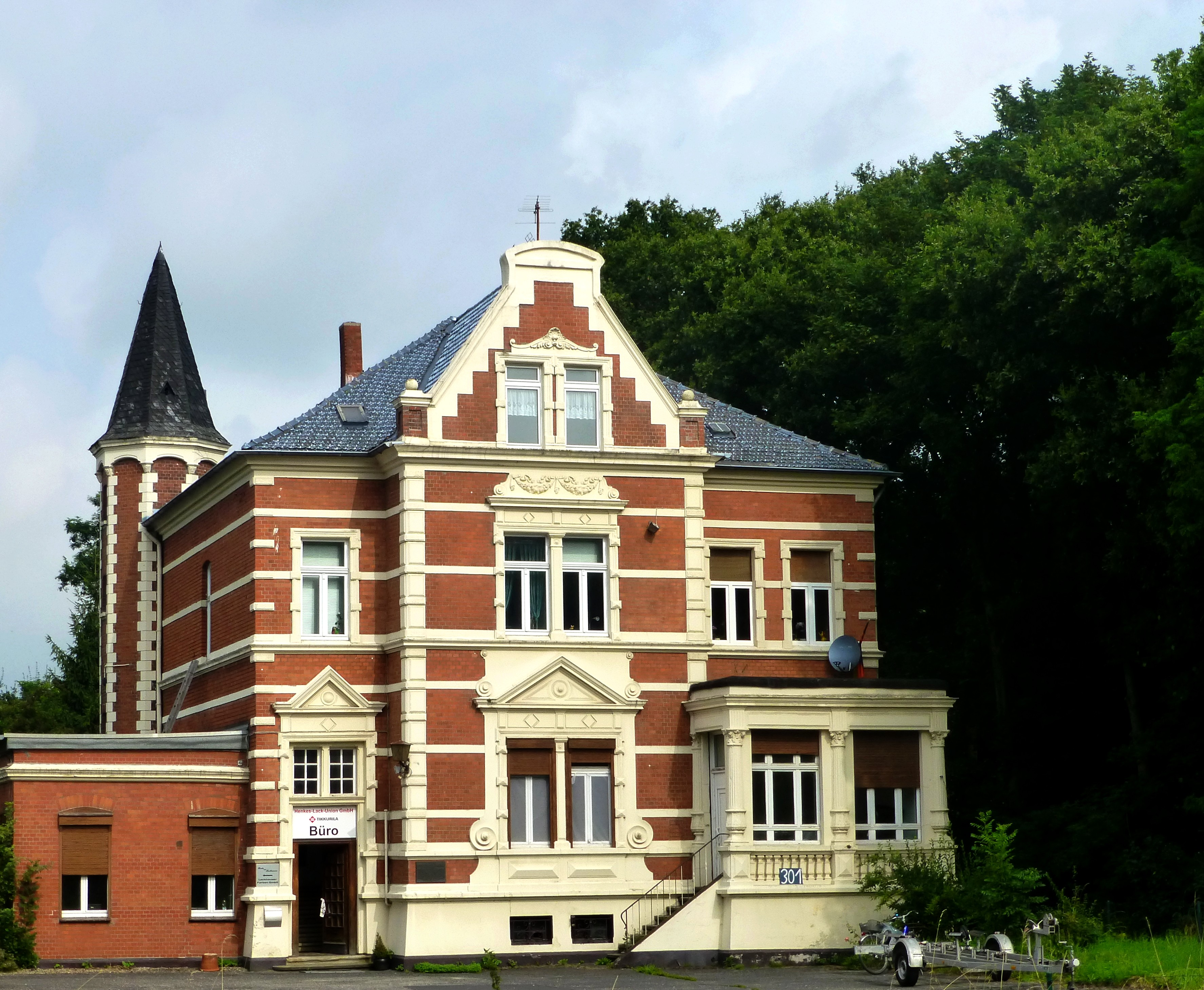 Wesel, Germany